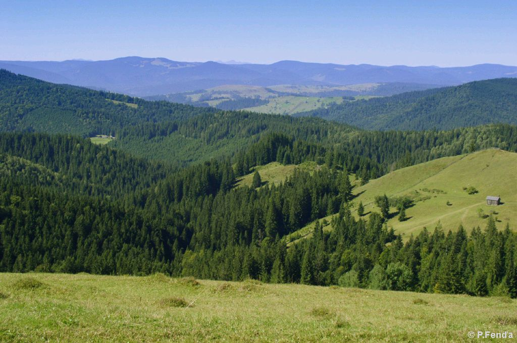 Obcina Mare, RomaniaRomania, Obcinele Bucovinei Mts.